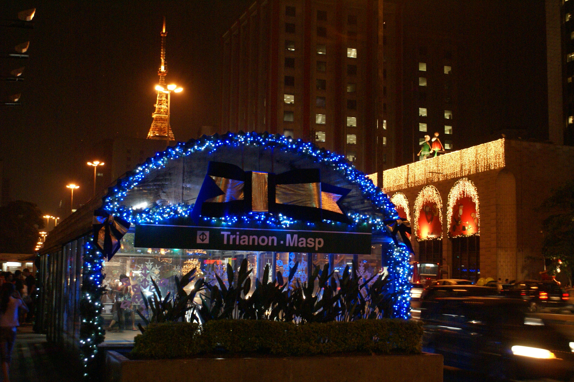 Estação Trianon-MASP no Natal de 2009, na Avenida Paulista, São Paulo. - Trianon-MASP Subway station in Christmas 2009, Paulista Avenue, São Paulo City.